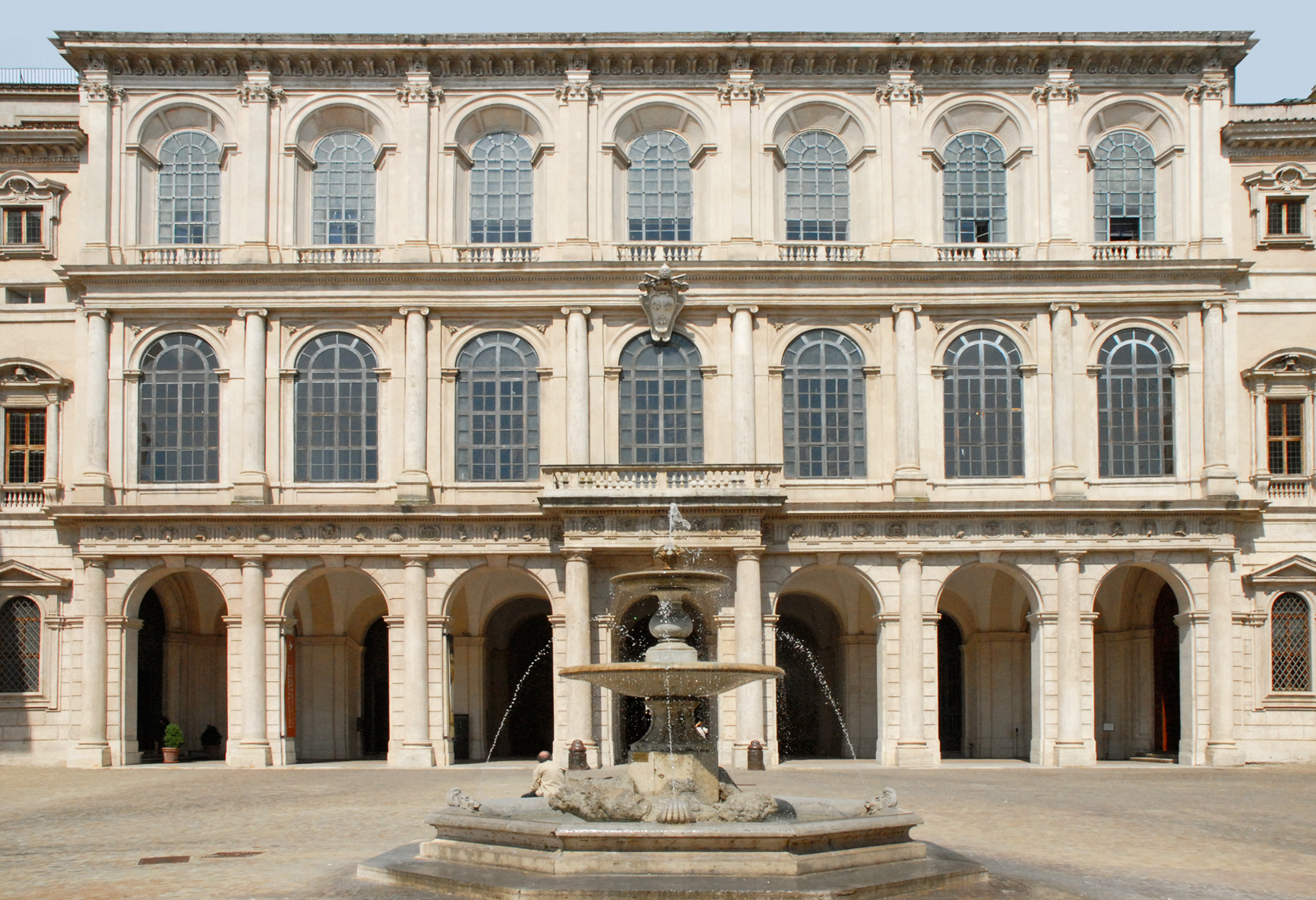 La façade centrale du palais Barberini Le palais a été conçu en 1625 par Carlo Maderno, à la demande du Cardinal Maffeo Barberini, devenu Pape en 1623 sous le nom d'Urbain VIII. La forme du bâtiment est celle d'une vaste villa avec deux ailes en H qui s'avancent dans des jardins. A la mort de l'architecte, Le Bernin reprend les travaux en collaboration avec Francesco Borromini. Les colonnes de la façade (Le Bernin) sont des trois ordres, dorique au rez-de-chaussée, ionien au premier étage, corinthien au deuxième étage, en pilastres. Le portique au rez-de-chaussée permet d'alléger l'allure du bâtiment. Les salles du premier étage ont toutes des plafonds peints dont celui du salon principal, oeuvre exceptionnelle pour sa taille et sa composition de Pierre de Cortone (Le Triomphe de la Divine Providence). Le palais accueille aujourd'hui la galerie nationale d'art ancien (Galleria nazionale d'arte antica) qui comprend des oeuvres très célèbres comme "La Fornarina" de Raphaël. Site officiel de la Galerie du palais Barberini